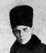 Ассоциация Эго-Футуризм. Ареопаг. Гнедов